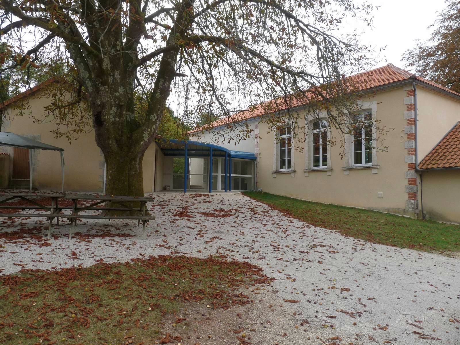 salle des fêtes de Vieux-Ruffec, Charente, France